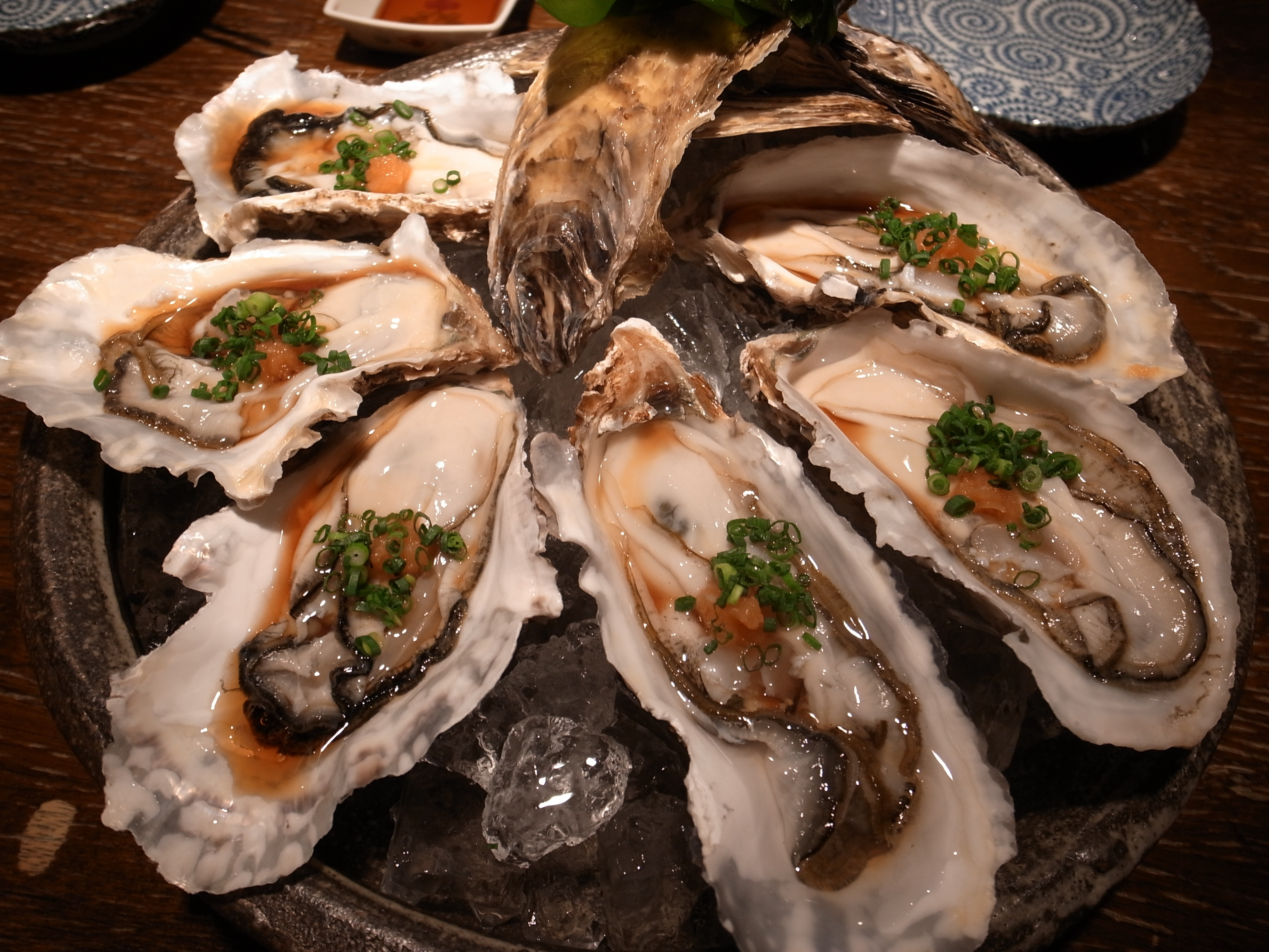 Oysters